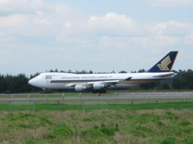 Boeing 747 de Singapore Airlines en el Aeropuerto Internacional El Dorado de Bogotá, Colombia.